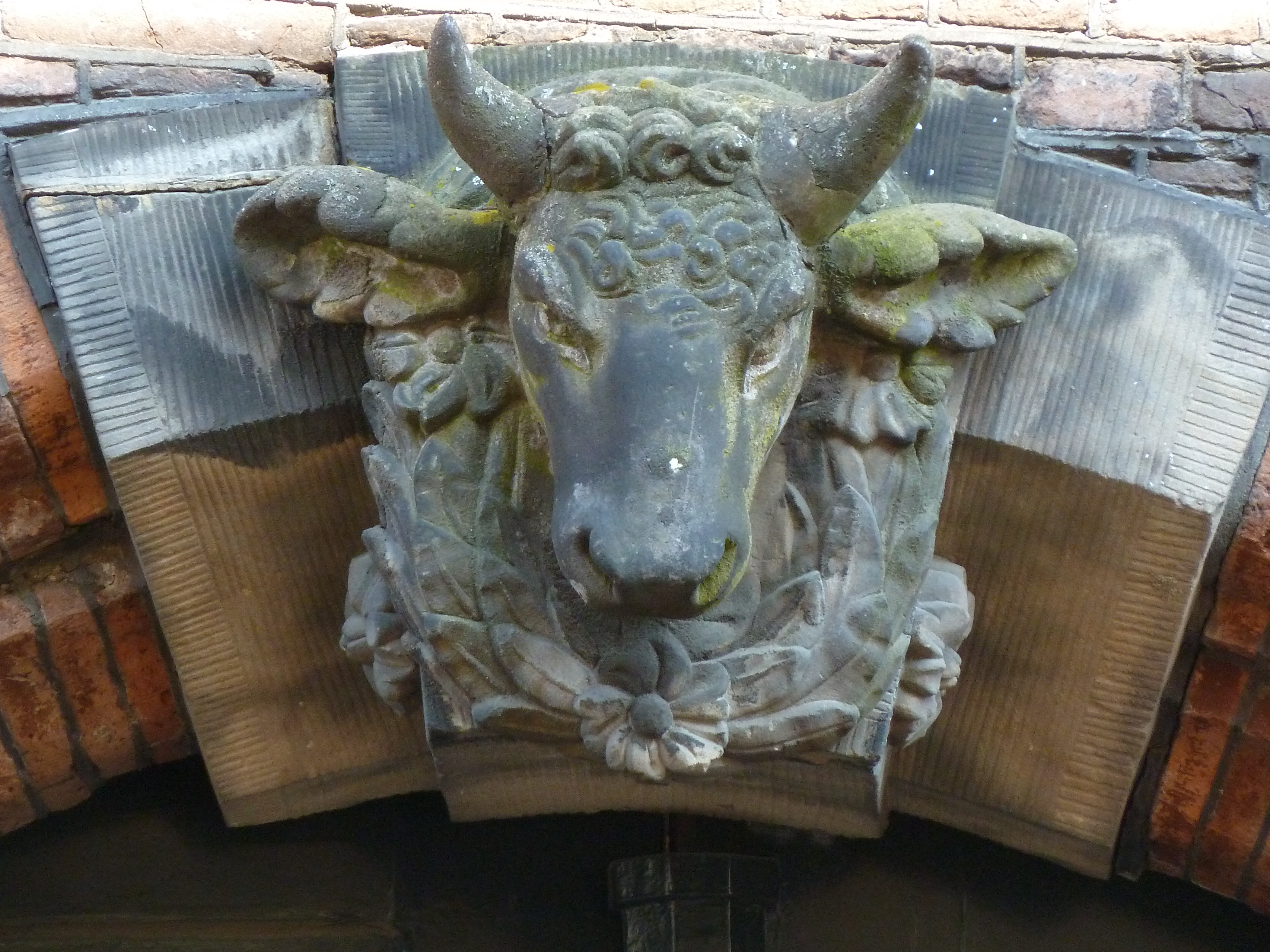 Jansveld 24A, Utrecht, NL. Rijksmonument. Ossenkop.